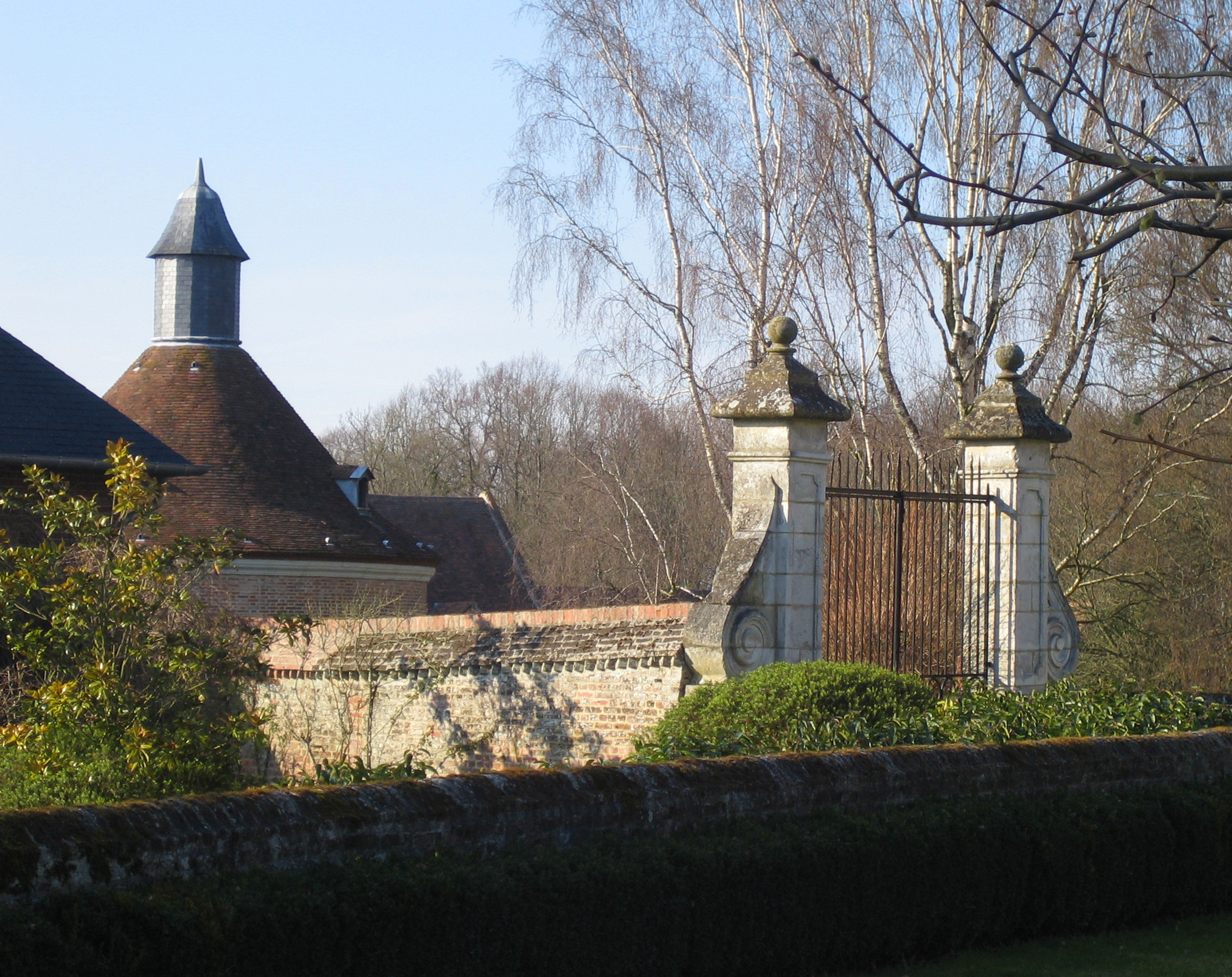 Frucourt (Somme, France) Toit du colombier et grille latérale. (géocodage ci-dessous très approximatif ... la ferme du château .... 2 ans plus tard, je n'ai plus bien ce lieu précis en tête et les vues satellites sont à cette date encore trop floues !)